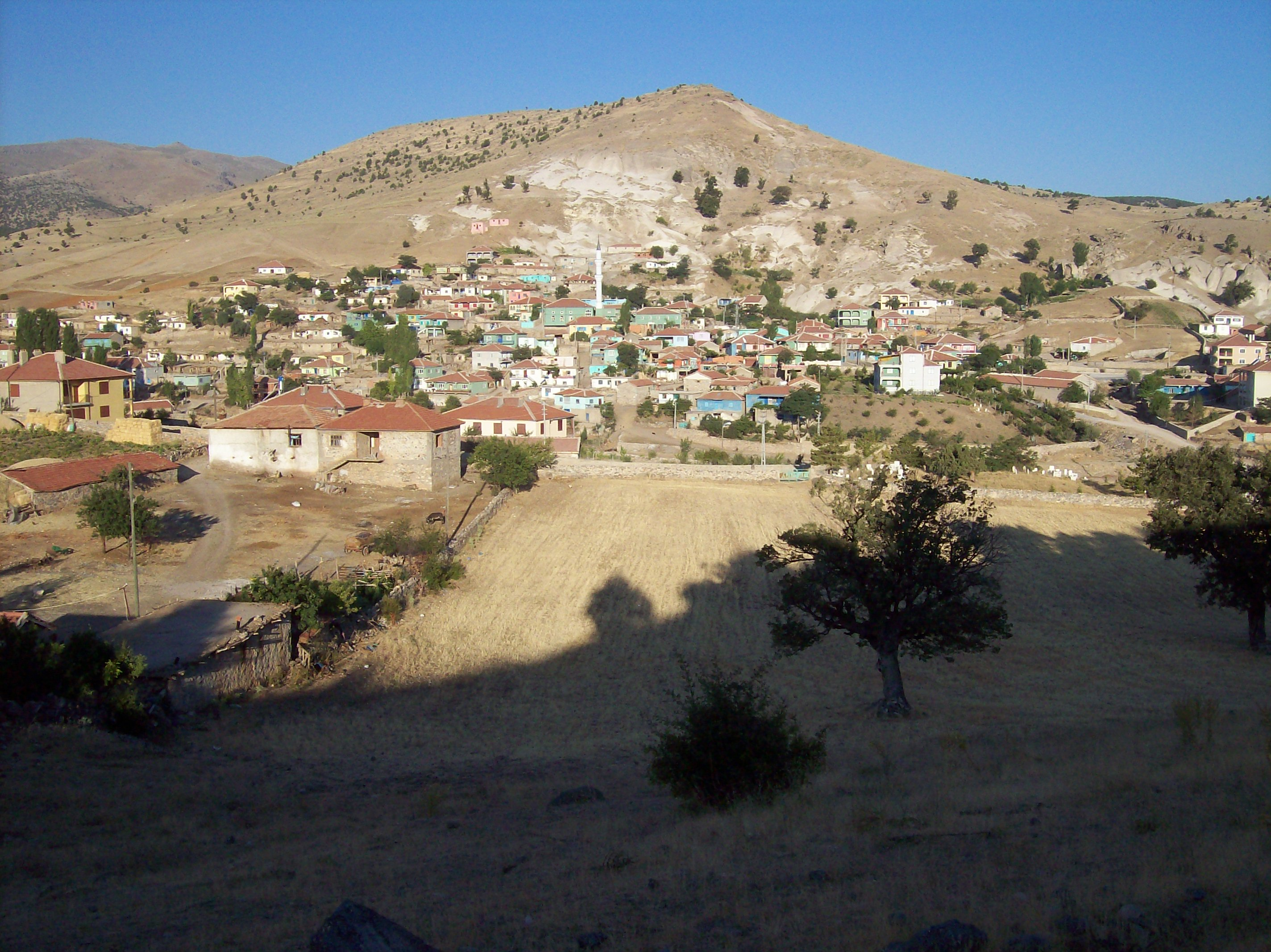 Çaykışla